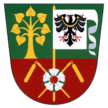 Česky: znak obce Sušice